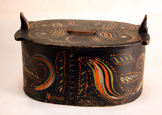 Tine med viksdalsmåling